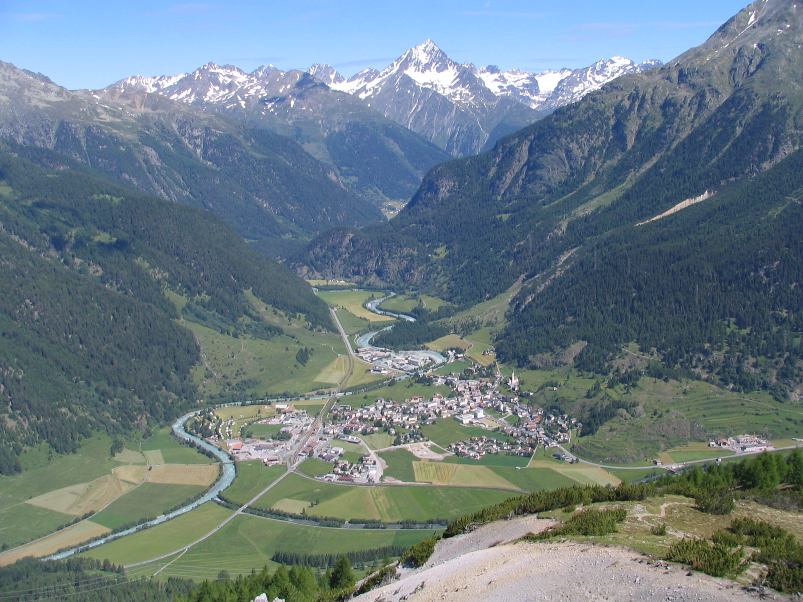 Zernez (Graubünden, Schweiz) von Süden gesehen